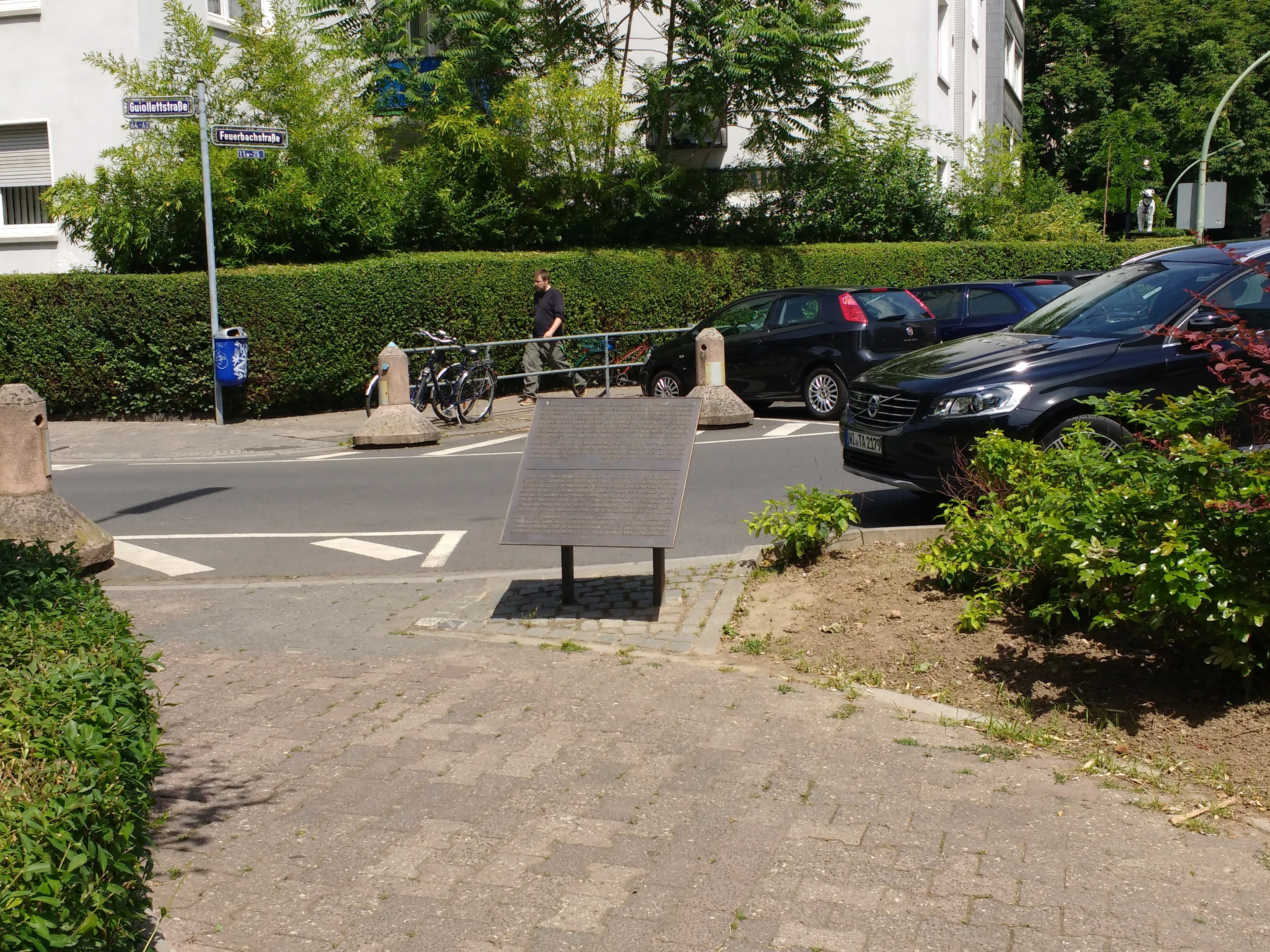 Die Tafel erinnert an die Hilfen, die die beiden englischen Diplomaten von ihrem Konsulat in Frankfurt aus für jüdische Menschen leisteten, um denen nach dem 9. November 1938 das Entkommen aus Nazi-Deutschland zu ermöglichen.